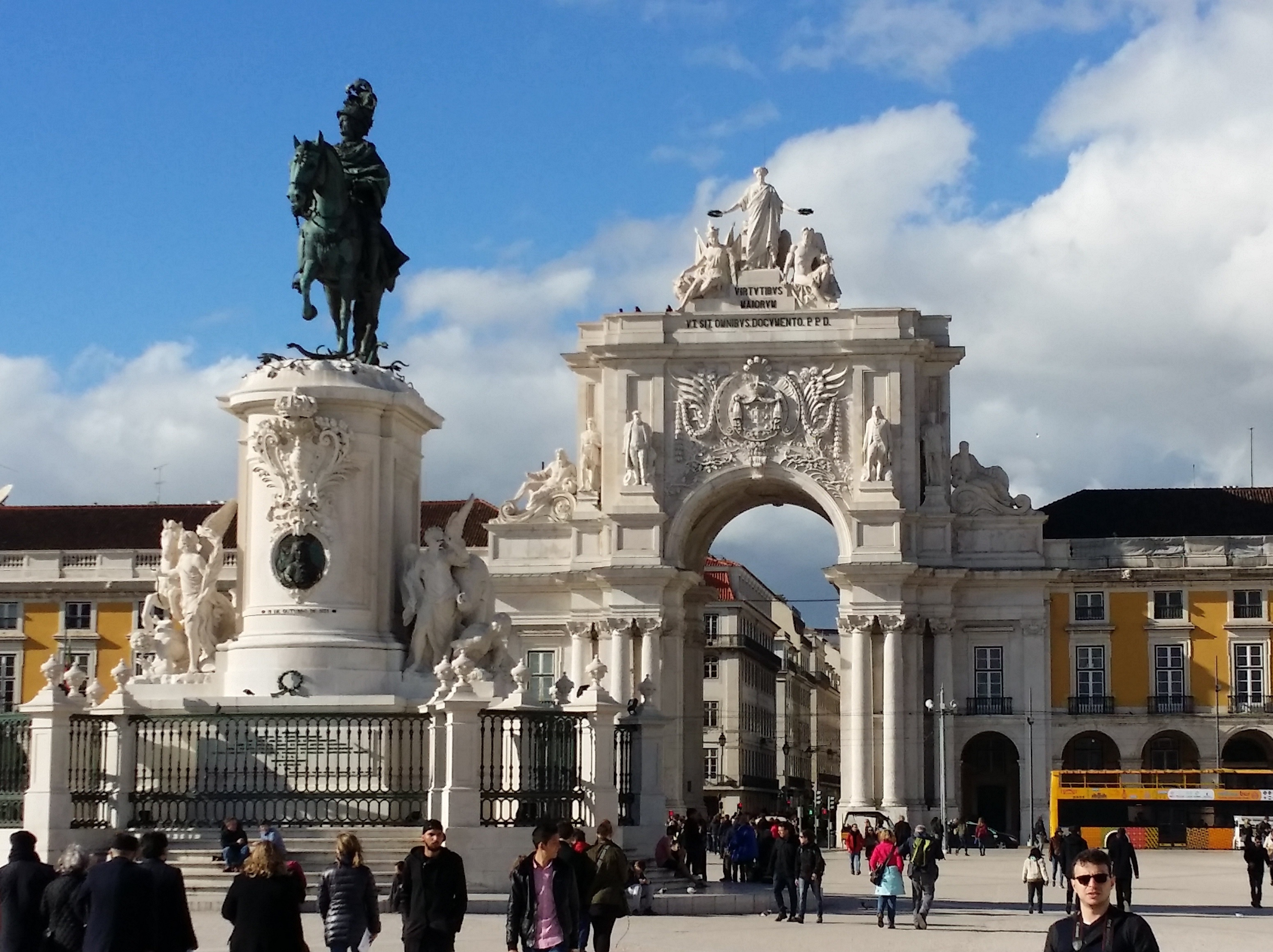 Lisbon